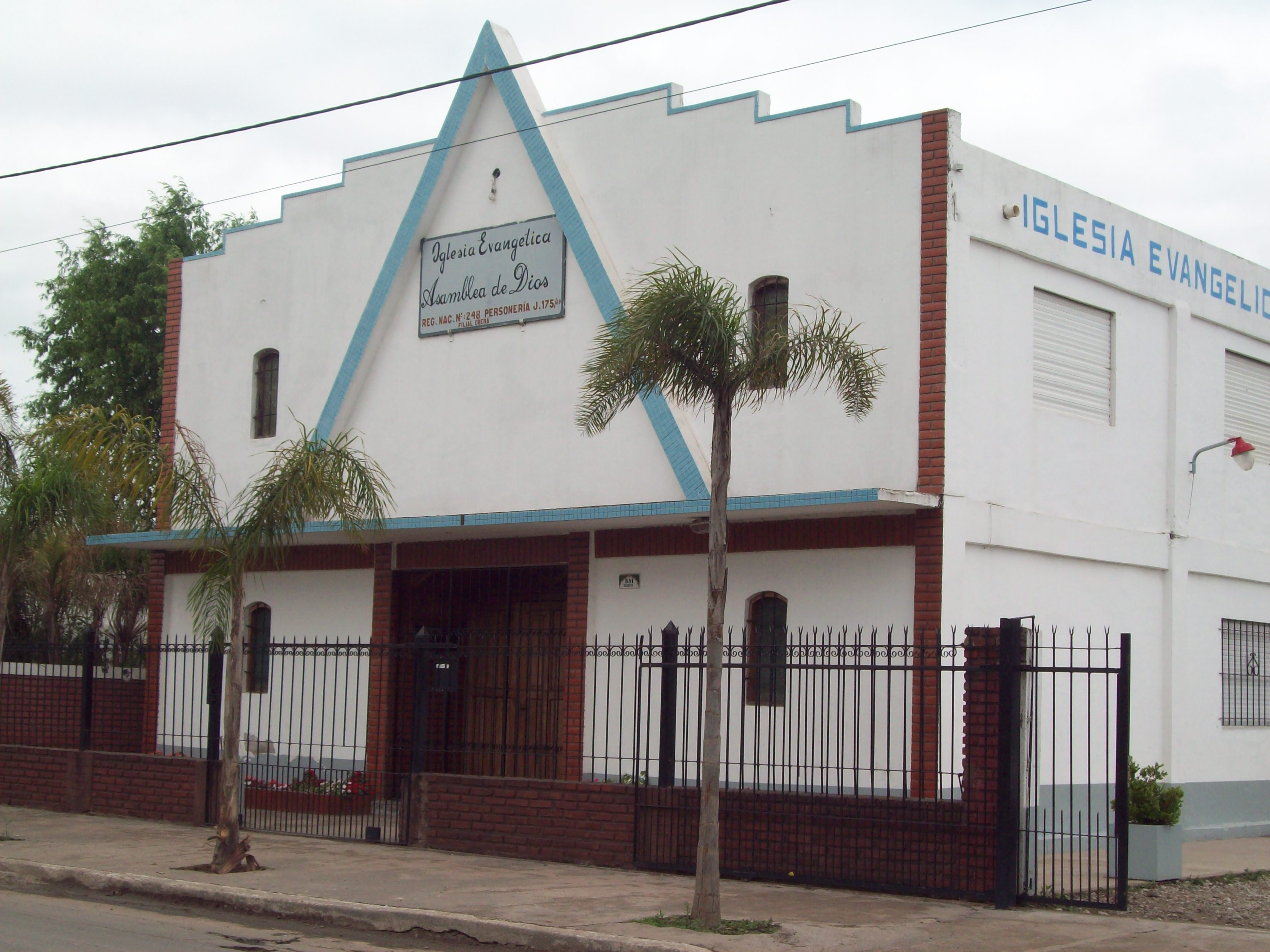 Iglesia Evangélica Asamblea De Dios Pilar, Argentina.